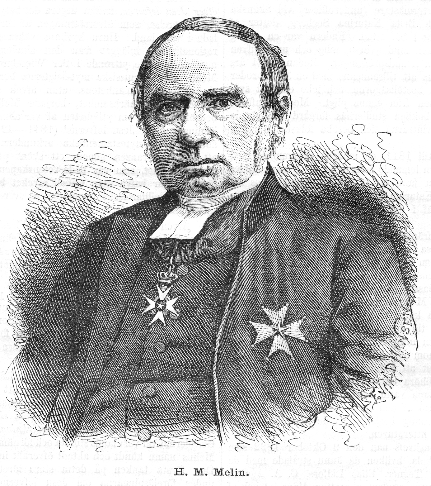 H M Melin